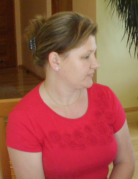 Iwona Okrzesik-Kotajny, polska łuczniczka, uczestniczka olimpiady w Barcelonie w 1992 roku